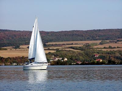 Sĺňava, v pozadí pohorie Považský Inovec.